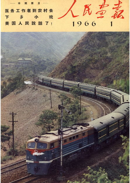 人民画报1966年第1期封面，主题为中国自制的内燃机车